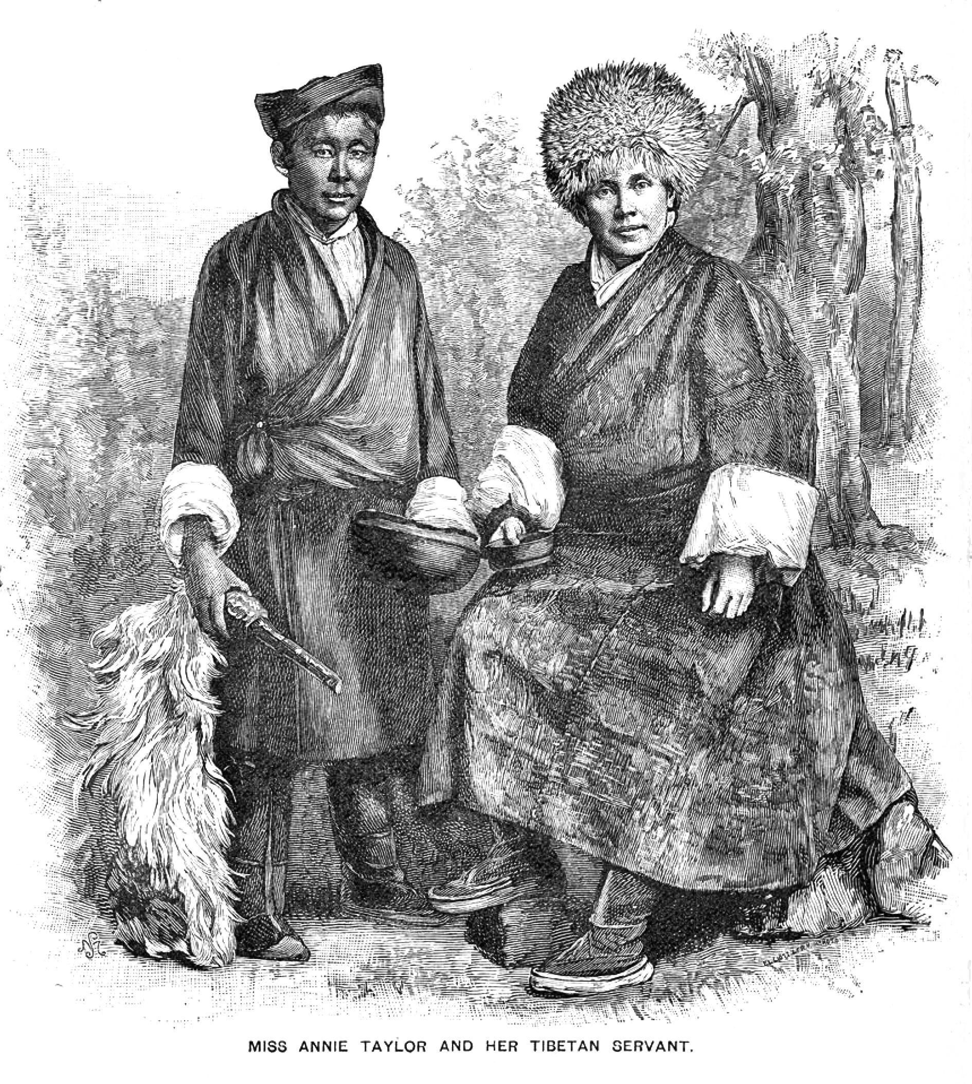 Annie R. Taylor, traveller and evangelist